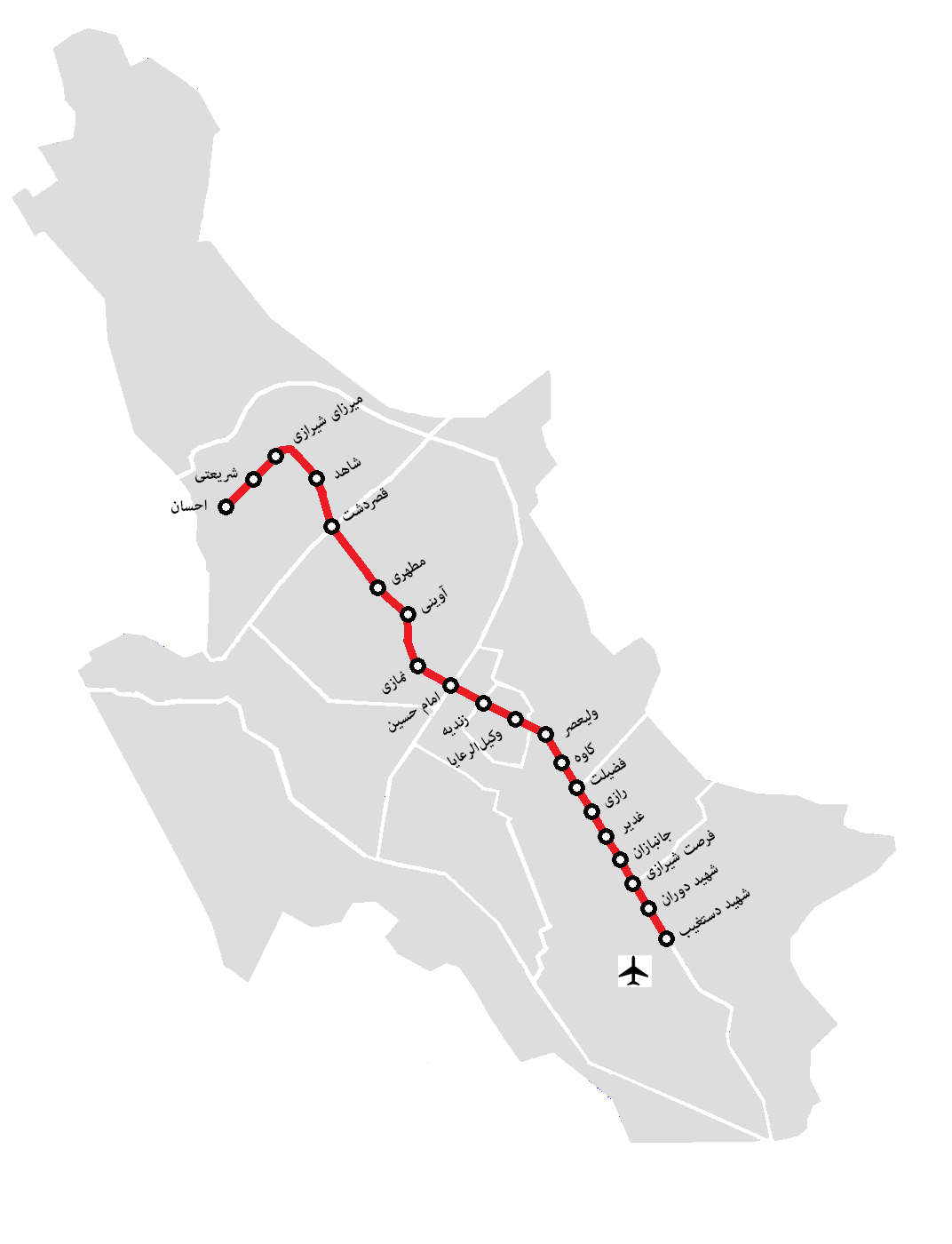 based on File:Shiraz Metro map-geo.png with persian lable